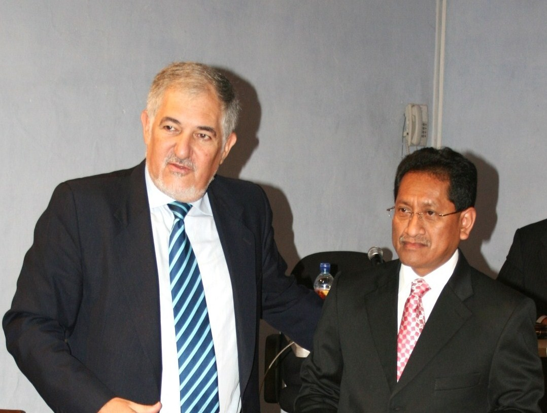 El Fiscal General de Guatemala, José Amilcar Velasquez Zárate, con el Presidente de la AIAMP, en el Centro de Formación de la Cooperación Española en La Antigua Guatemala.